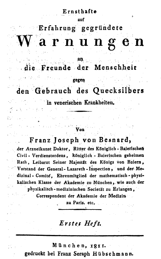 Franz Joseph von Besnard (1749-1814), Leibarzt des Königs von Bayern, Buchtitelblatt